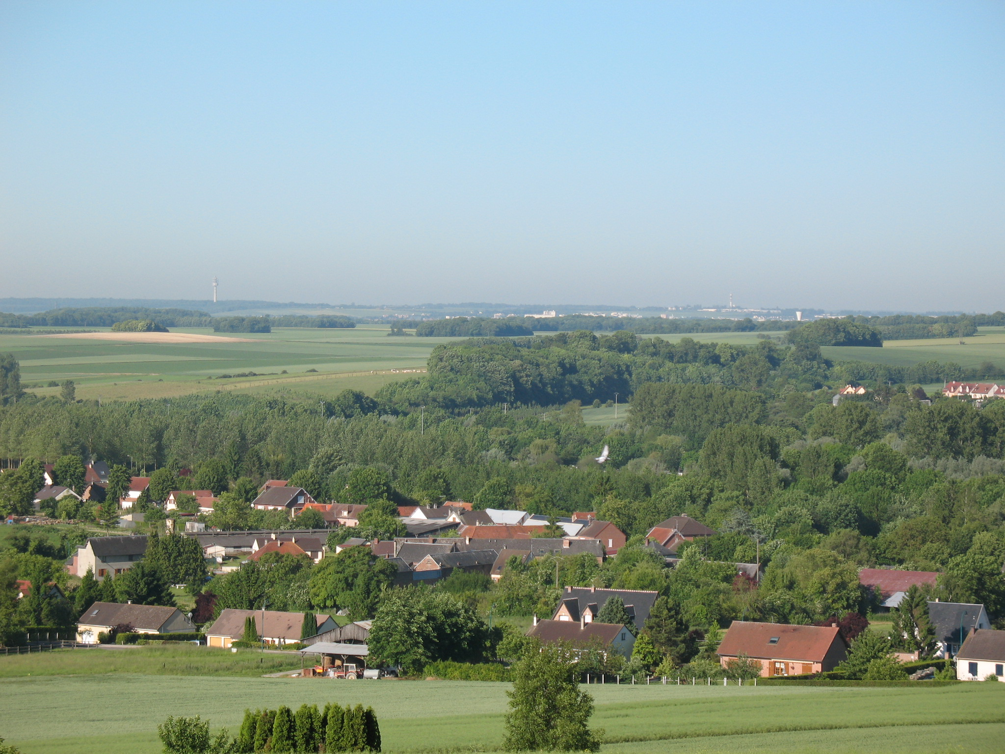 Peupleraie et prairie de la vallée de l'Hallue, en aval de Pont-Noyelles. En arrière-plan, on aperçoit la ville d'Amiens.